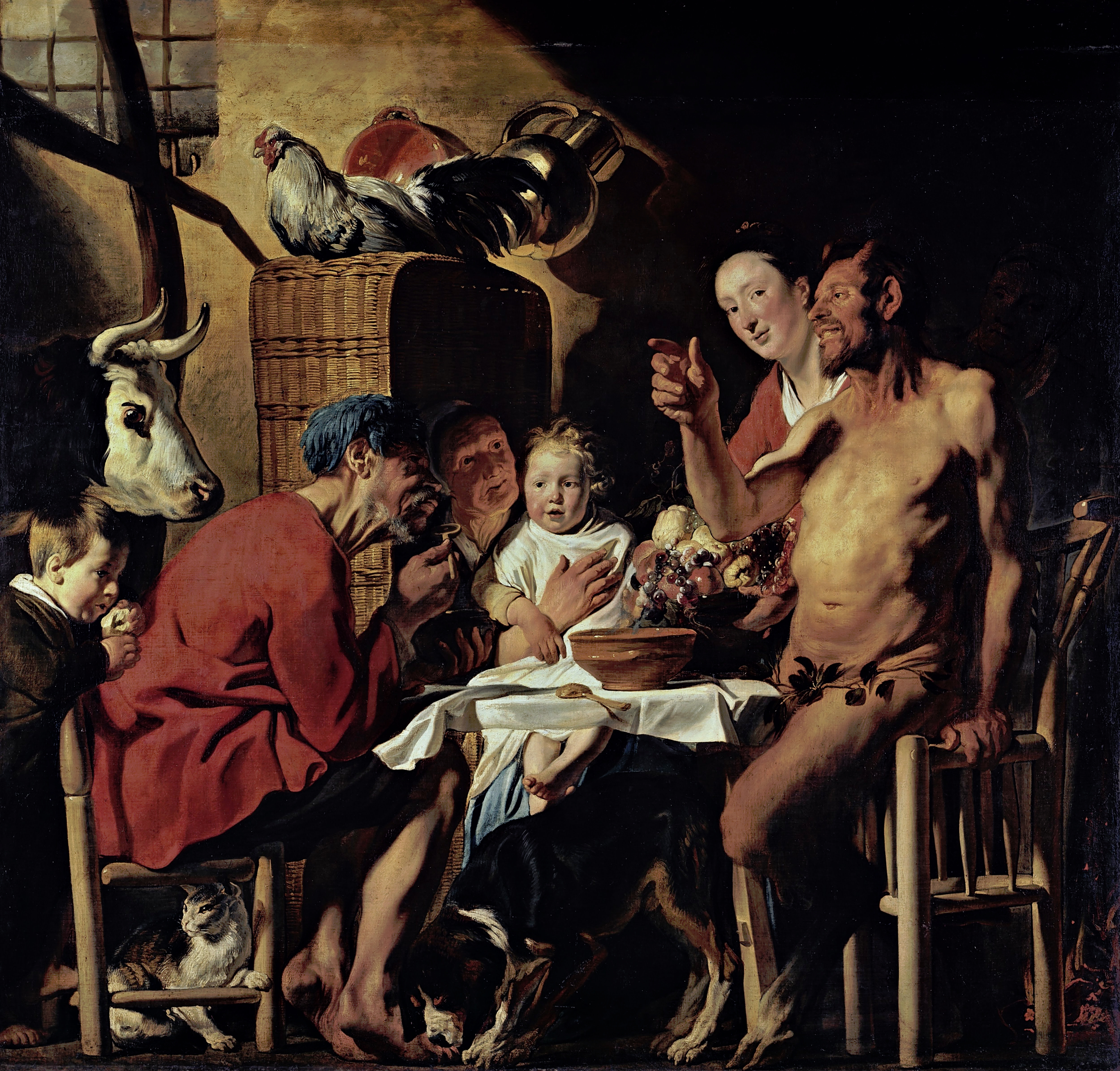 Die Geschichte geht auf eine Fabel des griechischen Dichters Aesop aus dem 6. Jh. v.Chr. zurück und beschreibt, wie ein Satyr (halb Mensch, halb Pferd) einen Bauern im Wald trifft, der ihn zu sich einlädt. Die gesellige Runde endet aber im Streit, da der Satyr den Bauern nach einem Vorfall als "doppelzüngig" beschimpft. Die Geschichte ist hier bildlich in Szene gesetzt.